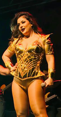 Li Martins na turnê Rouge 15 Anos.